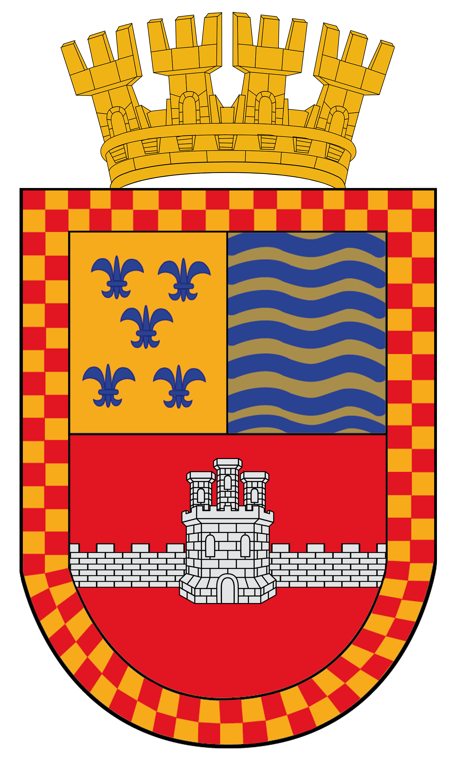 Escudo de la comuna de Santa Juana, Chile.